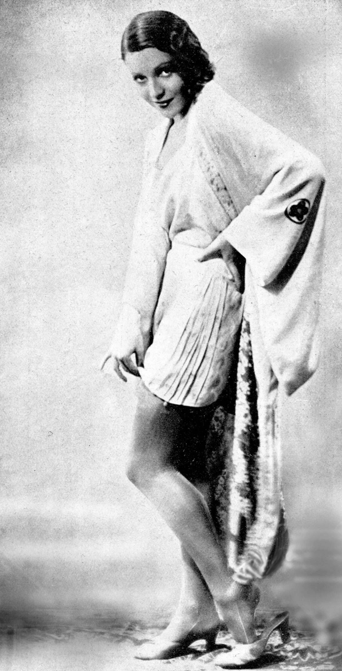 L'attrice Kathe von Nagy in una immagine diffusa in Italia nel 1931